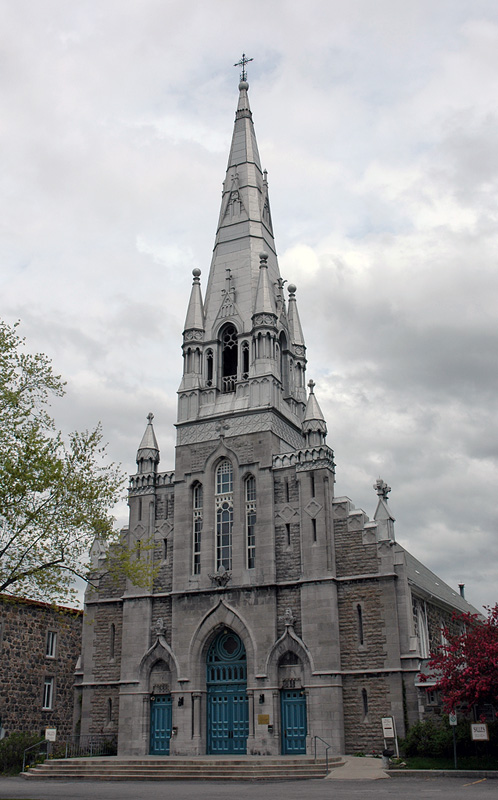 Photo de l'église de Saint-Hubert situé au 5310 Chemin Chambly.